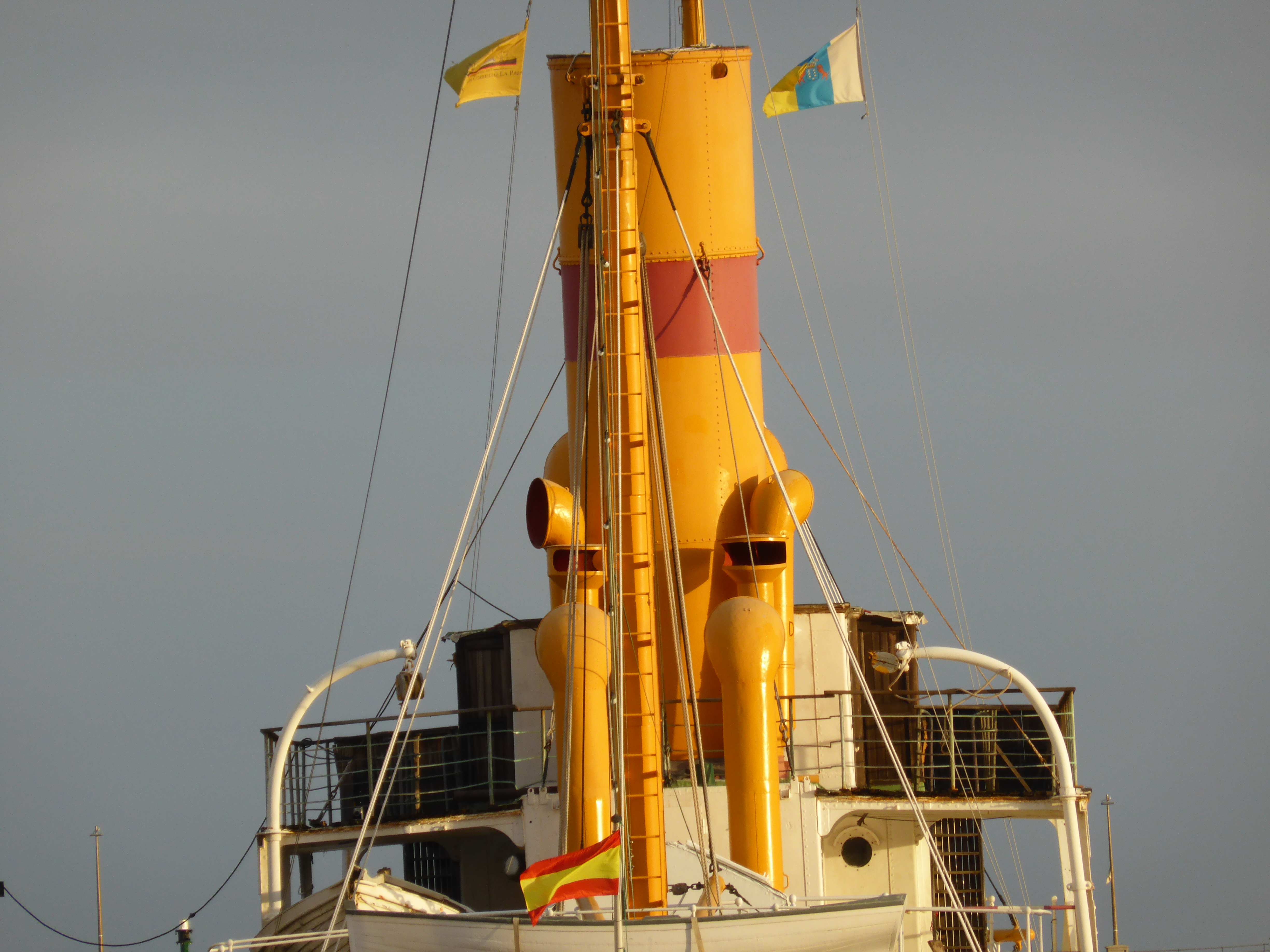 Vista parcial, desde popa a proa, del "correíllo" La Palma; viéndose un mástil, varios manguerotes de ventilación, la chimenea, tres banderas (de España, de Canarias y de la "Fundación Canaria Correíllo La Palma"). Este barco ya es centenario. Se conserva a flote en el Muelle Norte, de Santa Cruz de Tenerife (Canarias, España).